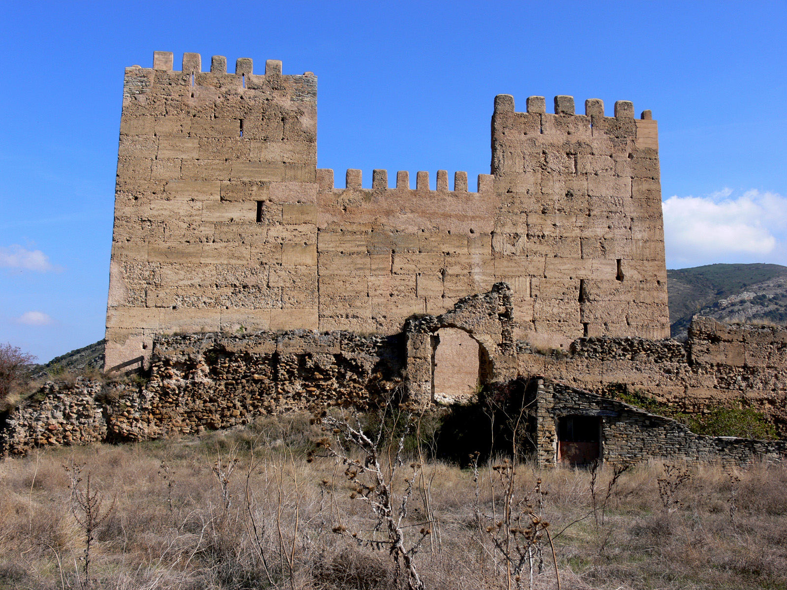 Castillo de Yanguas, Soria - España.